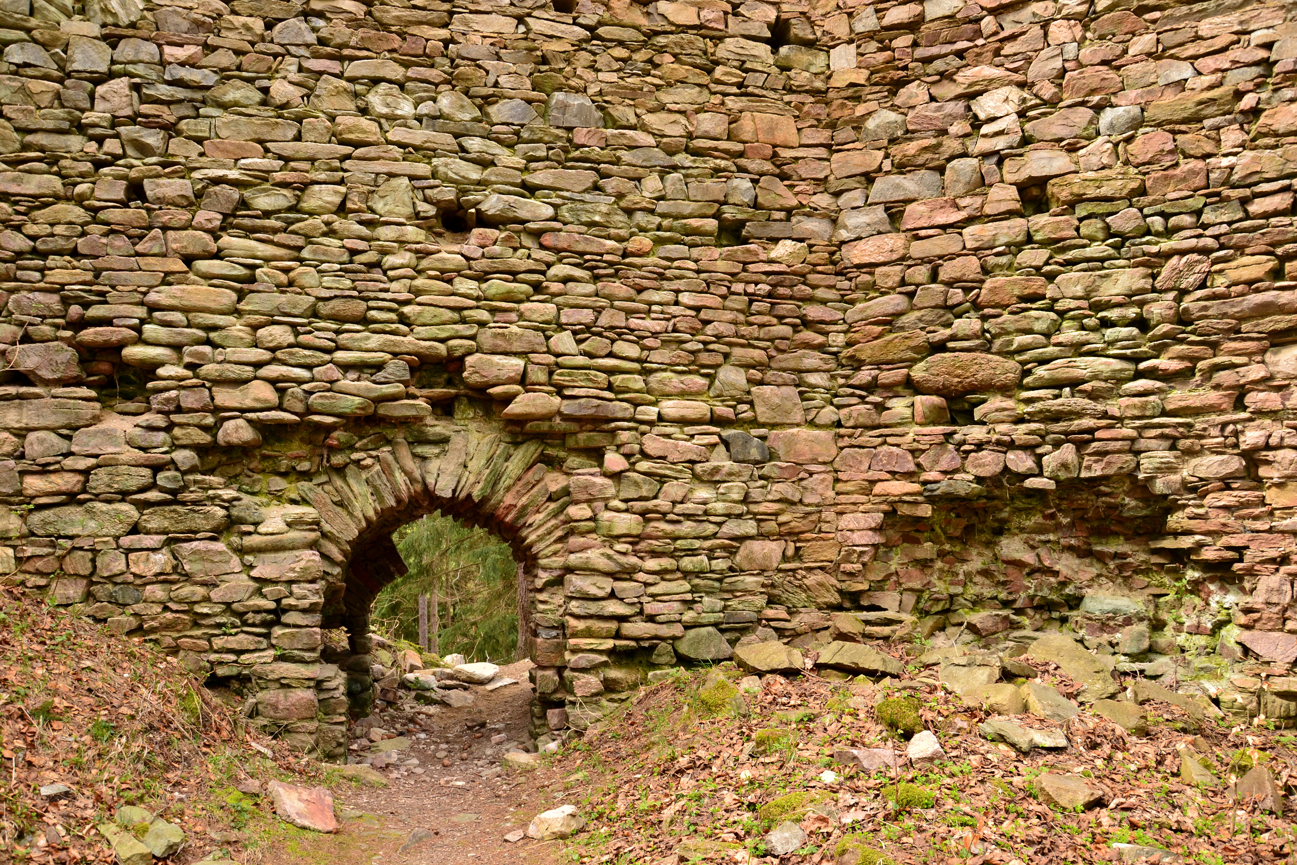 Branka z prvního nádvoří do parkánu